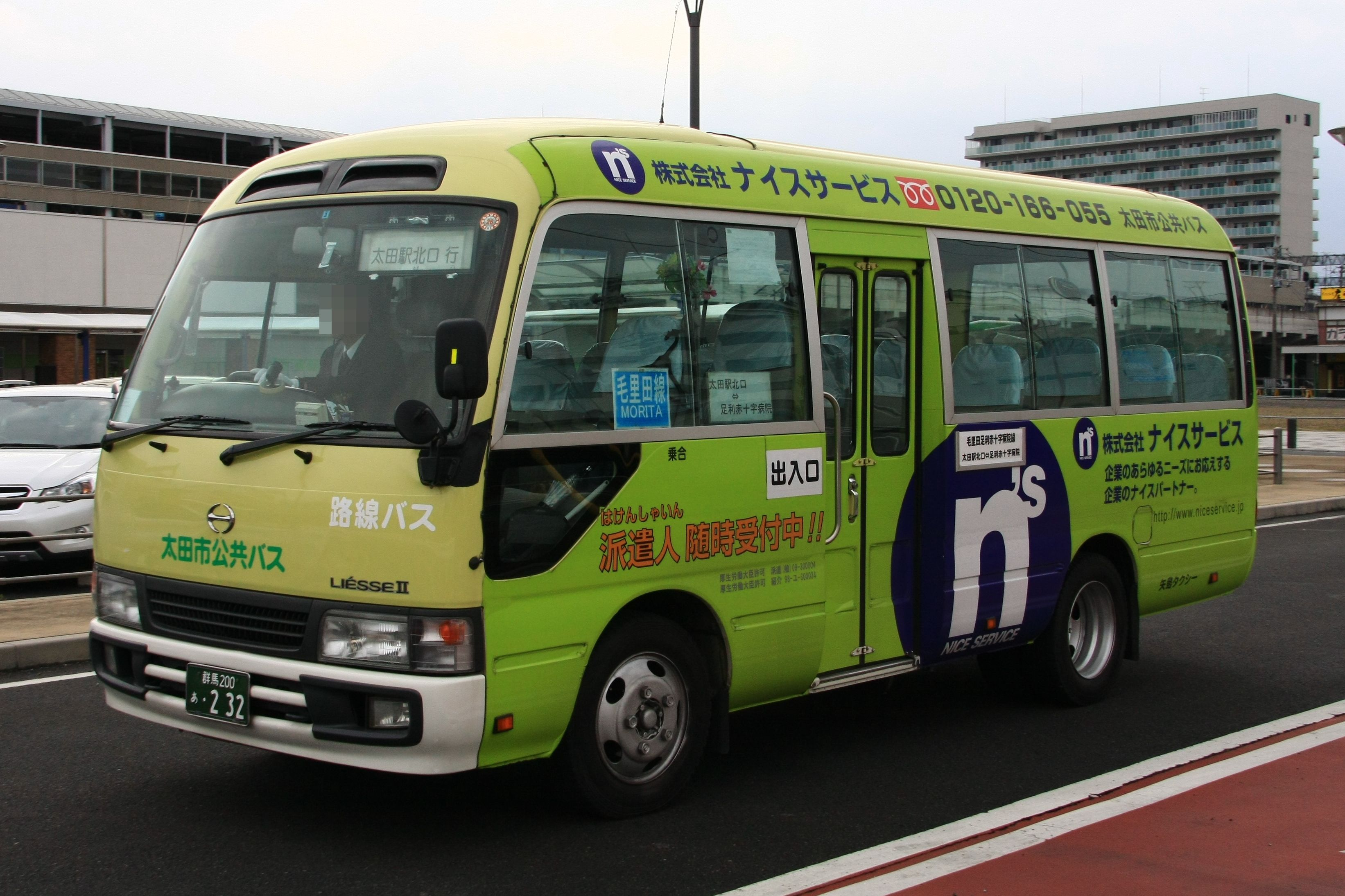 株式会社矢島タクシーが太田駅北口を起点に運行しているコミュニティバス「シティーライナーおおた」。またそれに使用される日野・リエッセⅡ。現在は廃止となった毛里田線での撮影。